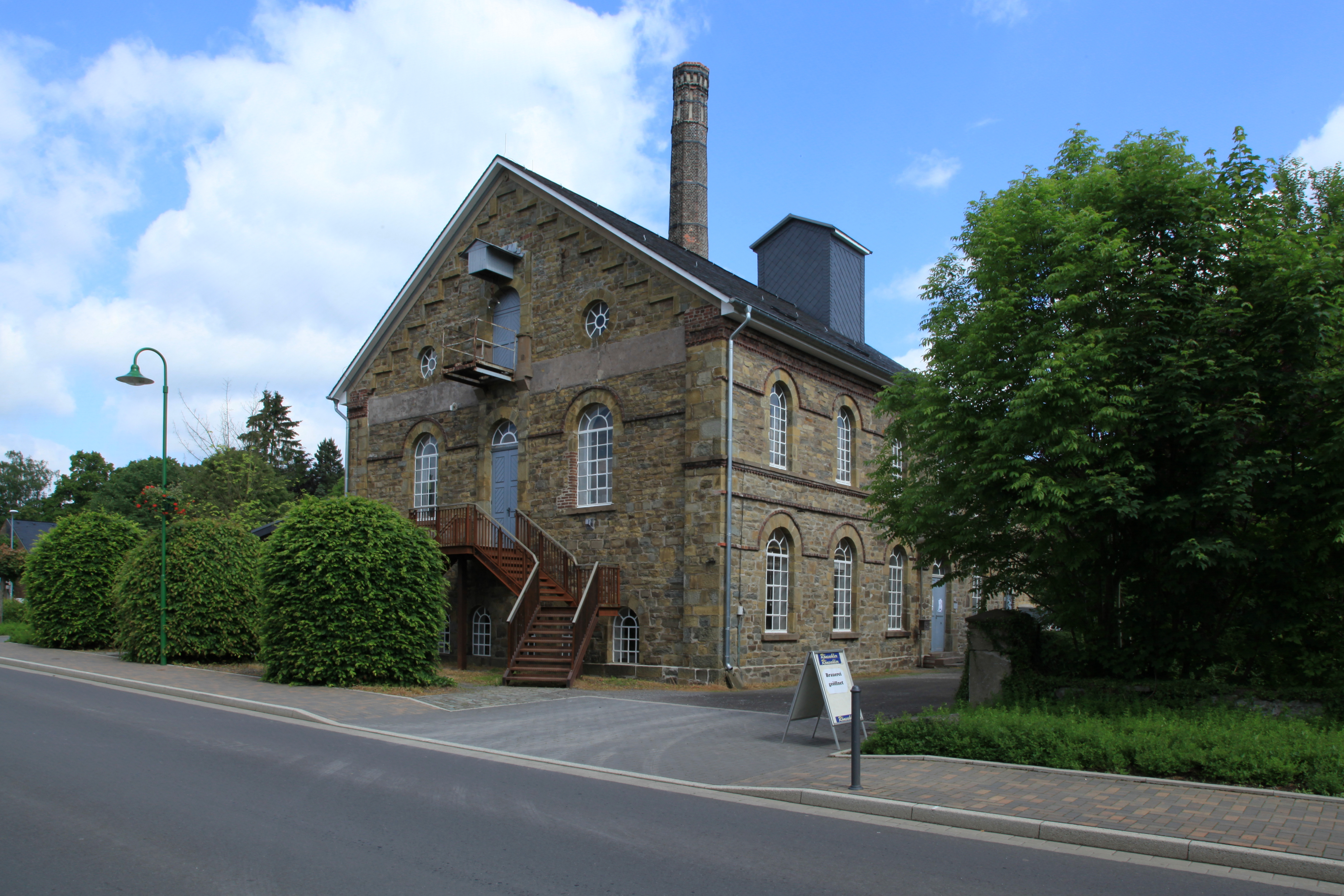 Historische Brennerei Rönsahl, jetzt Rönsaler Brauerei und Brennerei-/Brauereimuseum, Hauptstraße 23 in Rönsahl, Kierspe